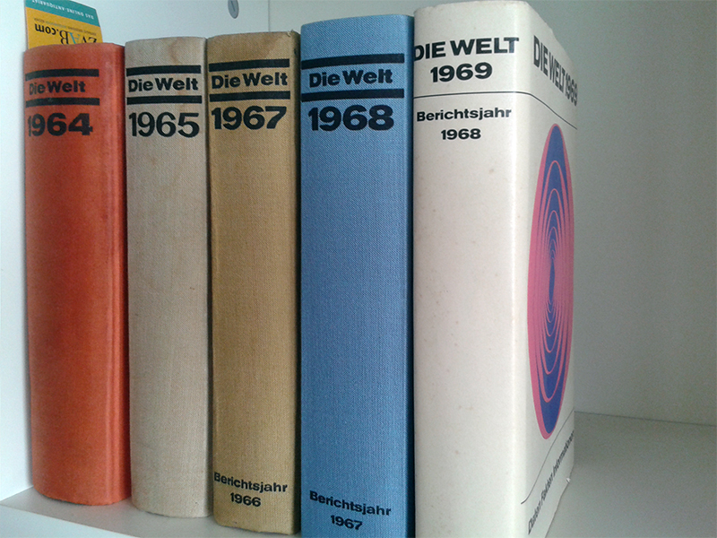 Jahrbücher "Die Welt - Daten, Fakten, Informationen" (1964-1969), Dietz-Verlag Berlin